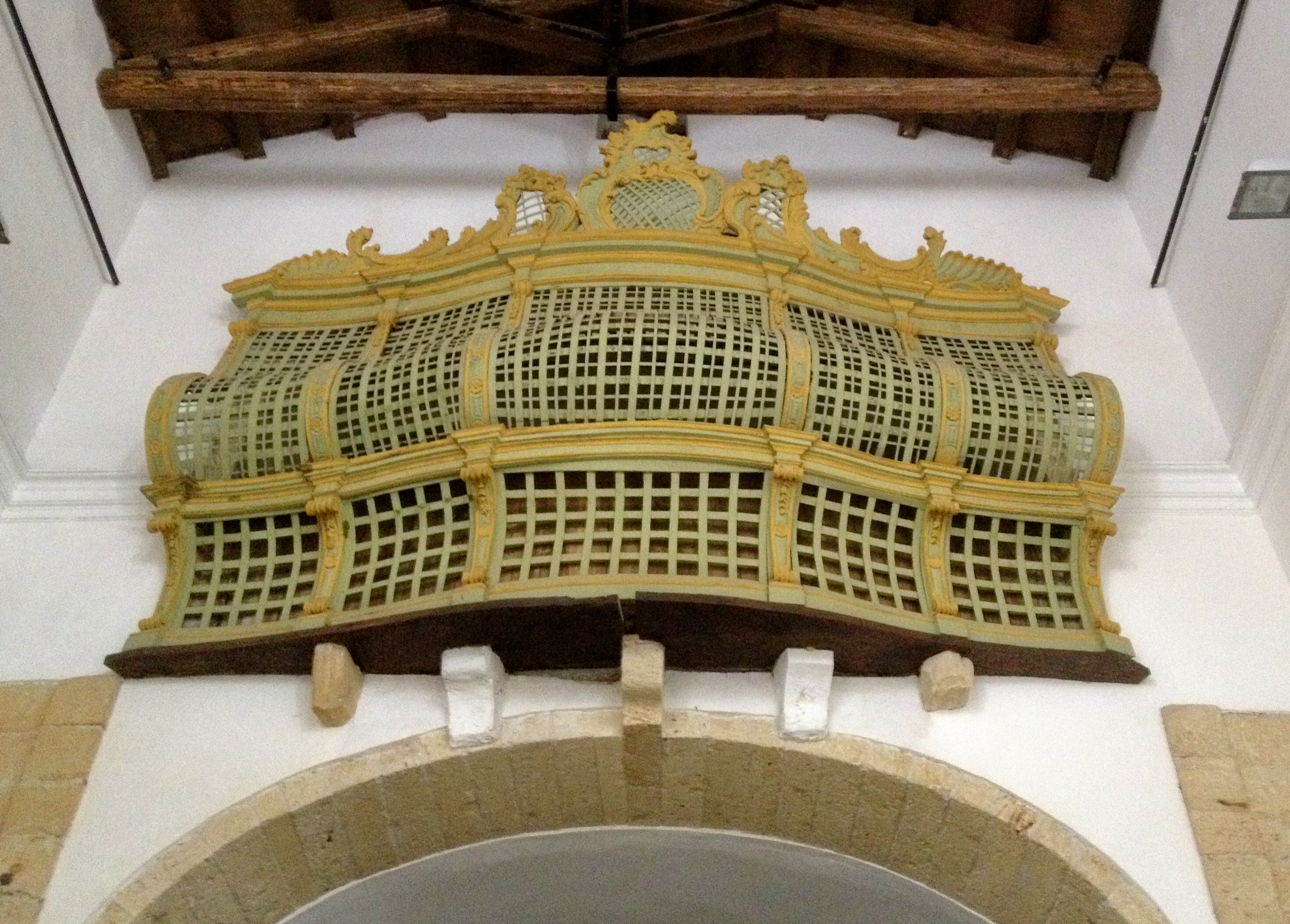 Interno chiesa dell'ex monastero benedettino di S. Agata. Coro delle monache, sec. XVIII.